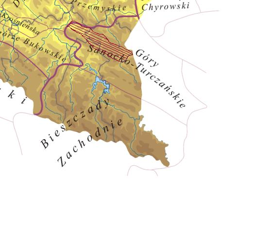 Polska: mezoregiony fizycznogeograficzne na tle hipsometrii (Physico-geographical mezoregions of Poland)